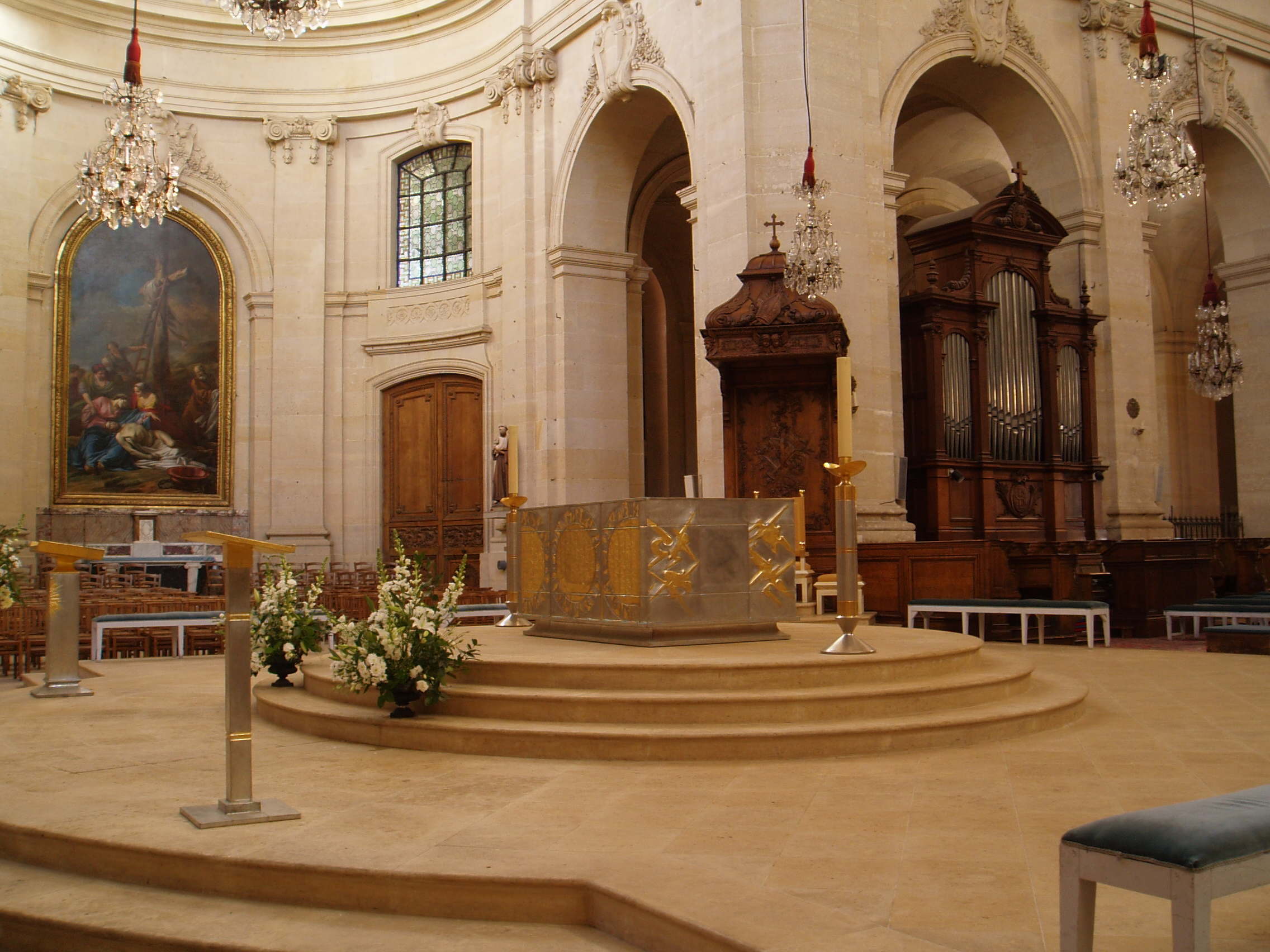 Cathédrale Saint Louis de Versailles Architecte : Jules Hardouin Masart de Sagonne Construction : 12 juin 1743 Inauguration : 24 août 1754 consacrée cathédrale en 1843